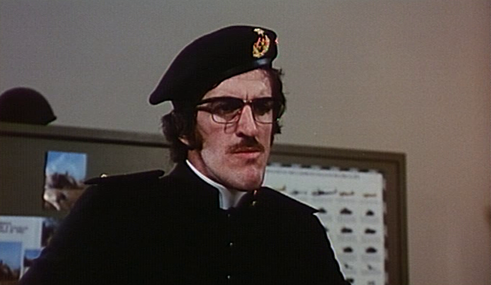 scena dal film 4 marmittoni alle grandi manovre